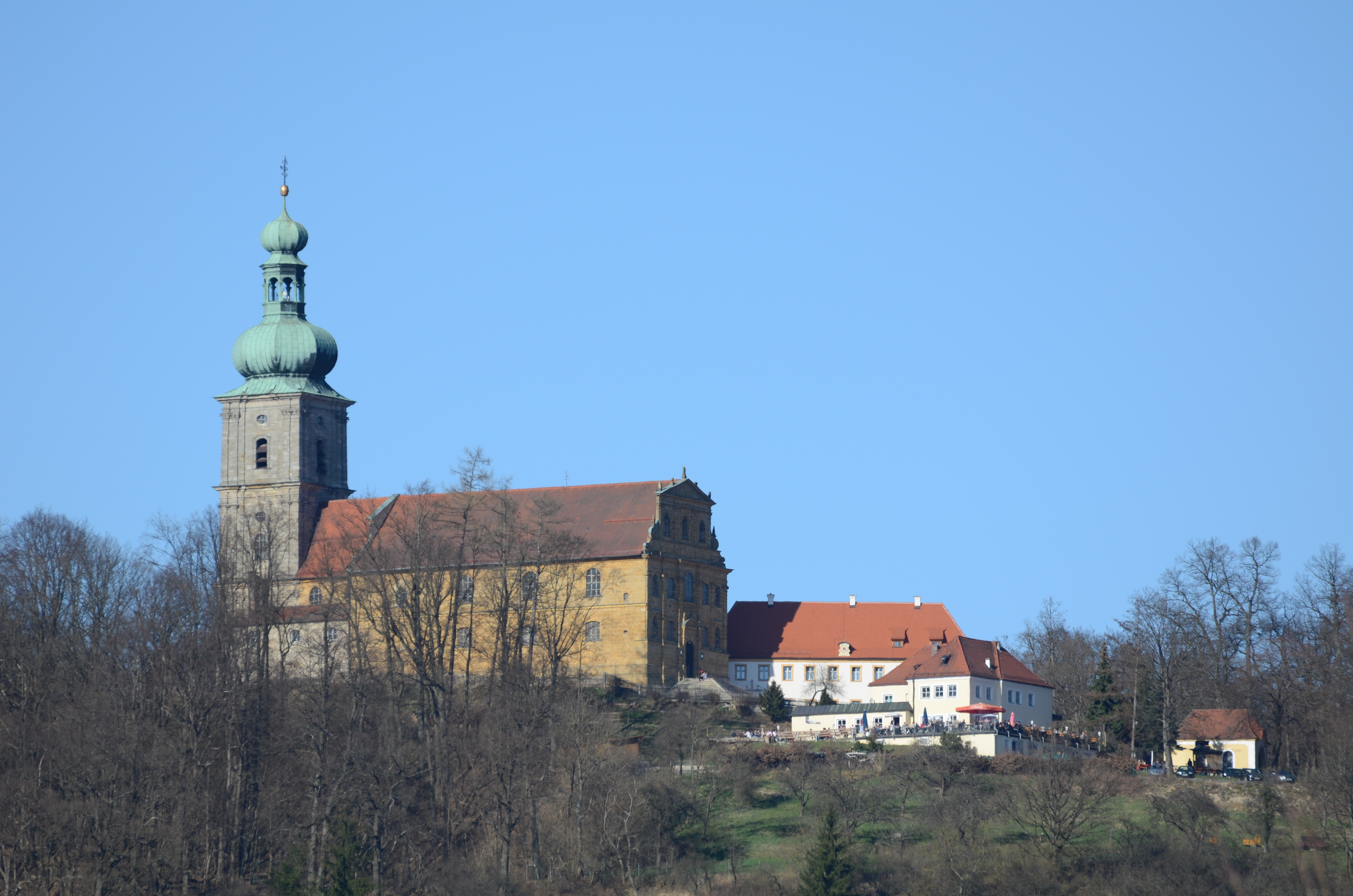 Amberg Wallfahrtskirche Maria HilfThis is a photograph of an architectural monument.